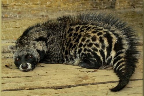 Африканская цивета (Civettictis (viverra) civetta), Ростовский-на-Дону зоопарк (Rostov on Don Zoo)